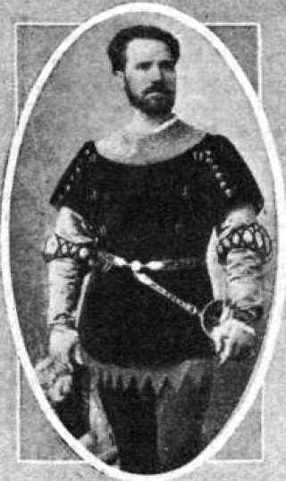 El tenor español Julián Gayarre caracterizado como Fernando durante su debut en 1876 en la Scala de Milán con la ópera La favorita